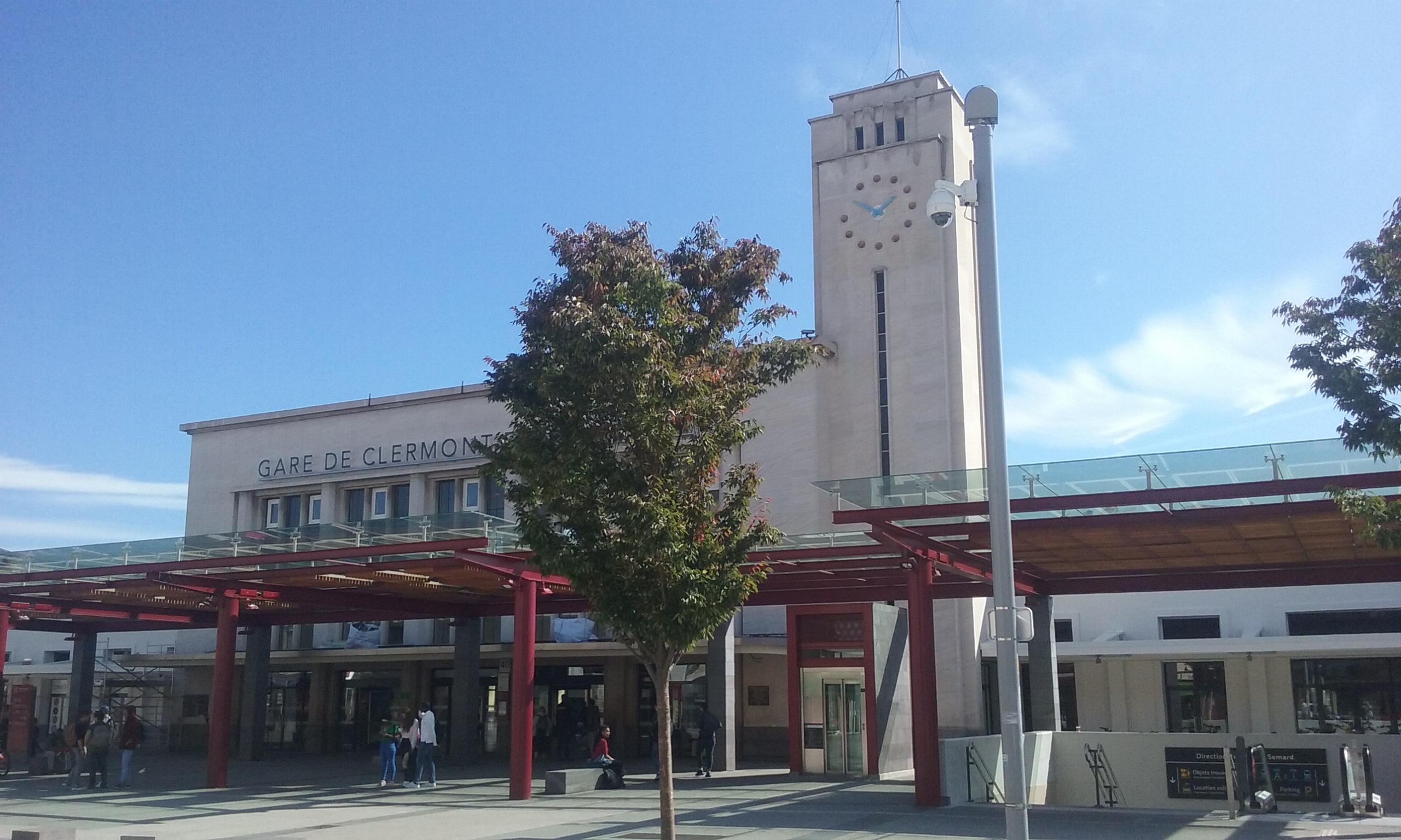 Gare de Clermont-Ferrand, Auvergne, France.